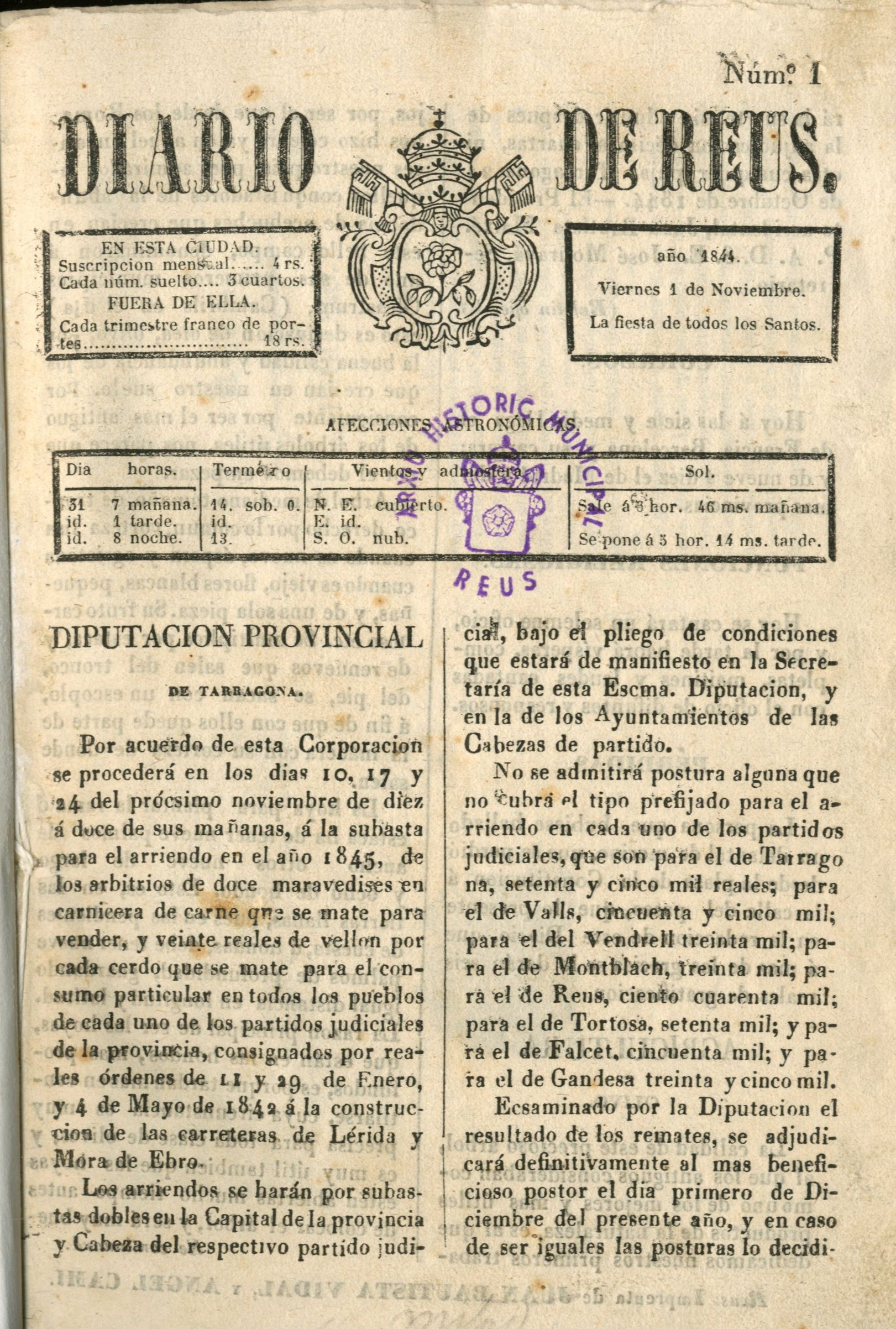 Primera pàgina del núm. 1 del Diario de Reus 1844